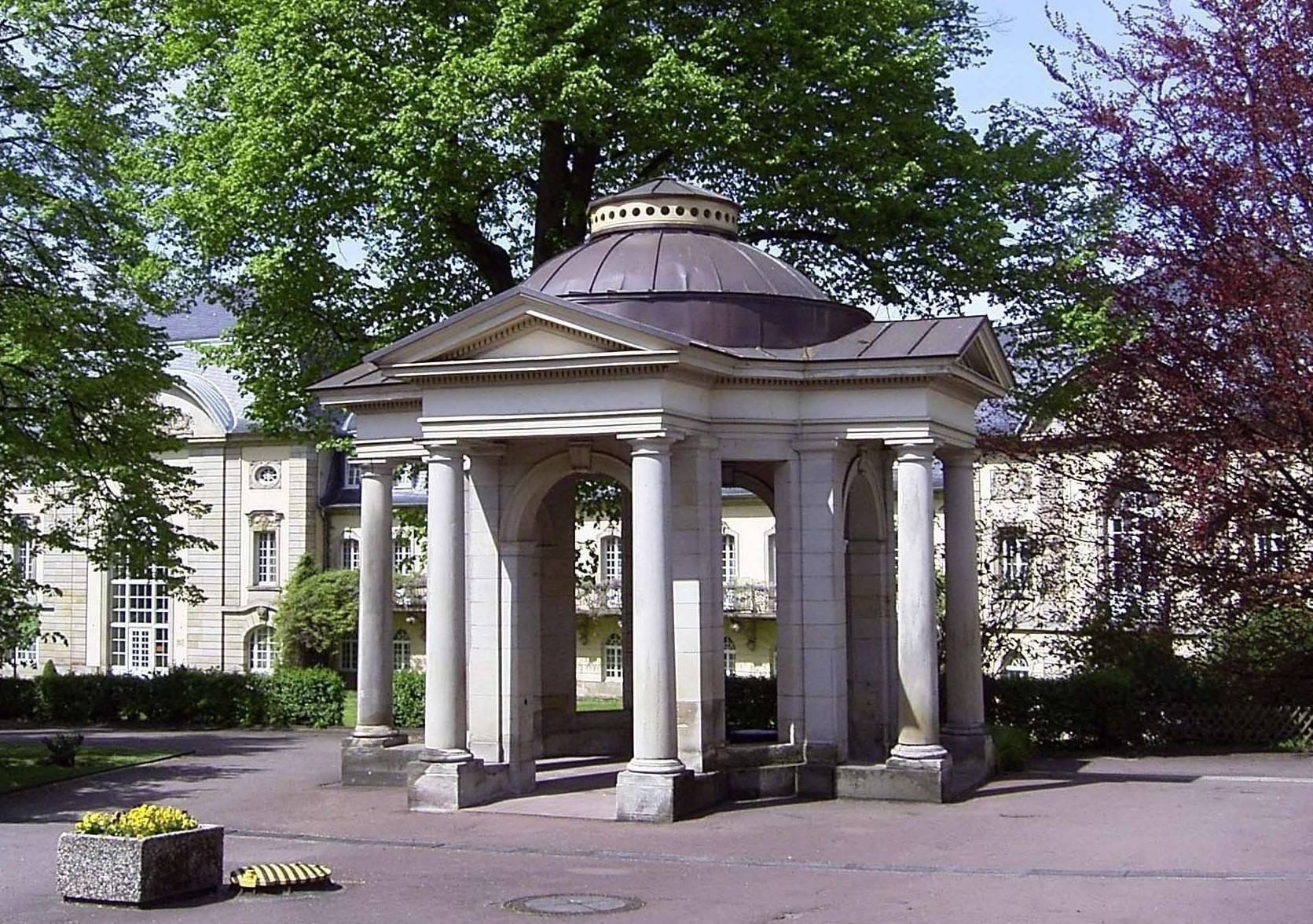 Der 1842 erbaute Brunnentempel über der Schwefelquelle auf der Esplanade in Bad Nenndorf.